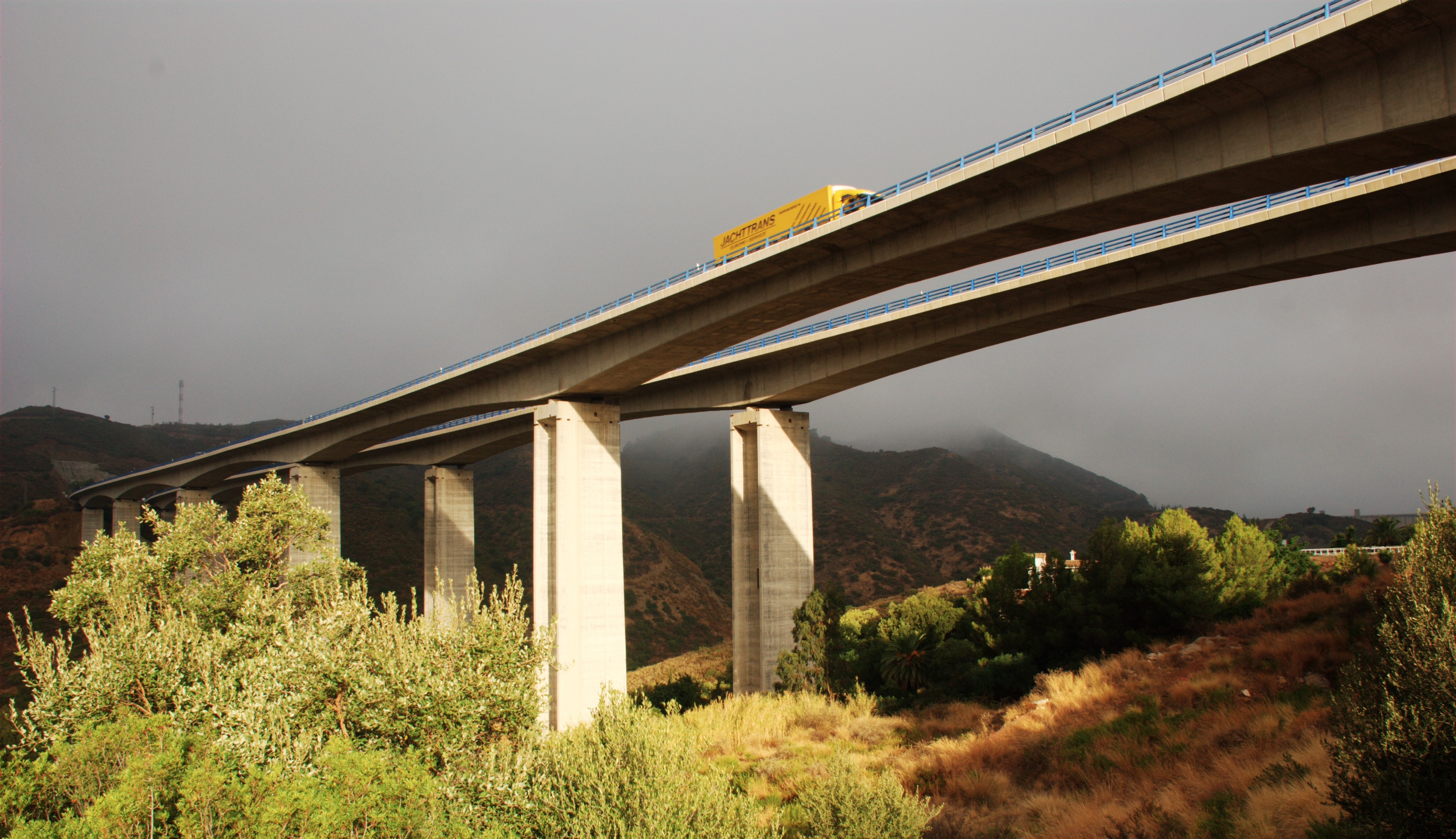 Viaducto de la AP7, sobre el río Verde, en el municipio de Marbella.